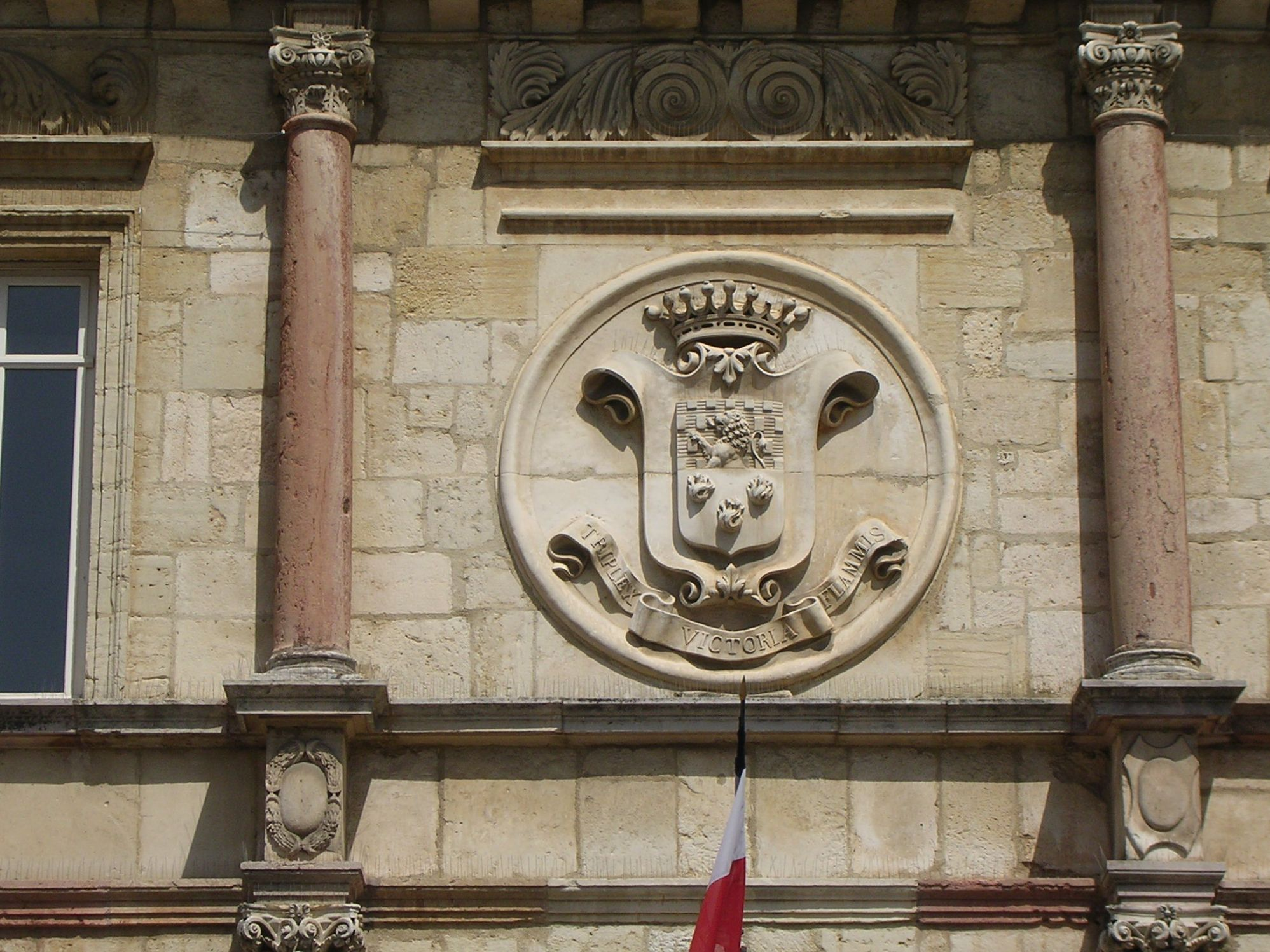 Gray (Haute-Saône) La devise de la ville sur la façade de l'hôtel de ville